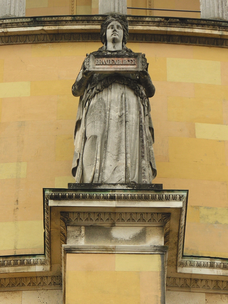 Diese Statue an der Aussenseite der Befreiungshalle in Kelheim steht für den Volksstamm der Brandenburger, Höhe der Statue 580 cm. Sie ist eine von 18 Statuen, die nach Modellen des Bildhauers Johann Halbig geschaffen wurden.